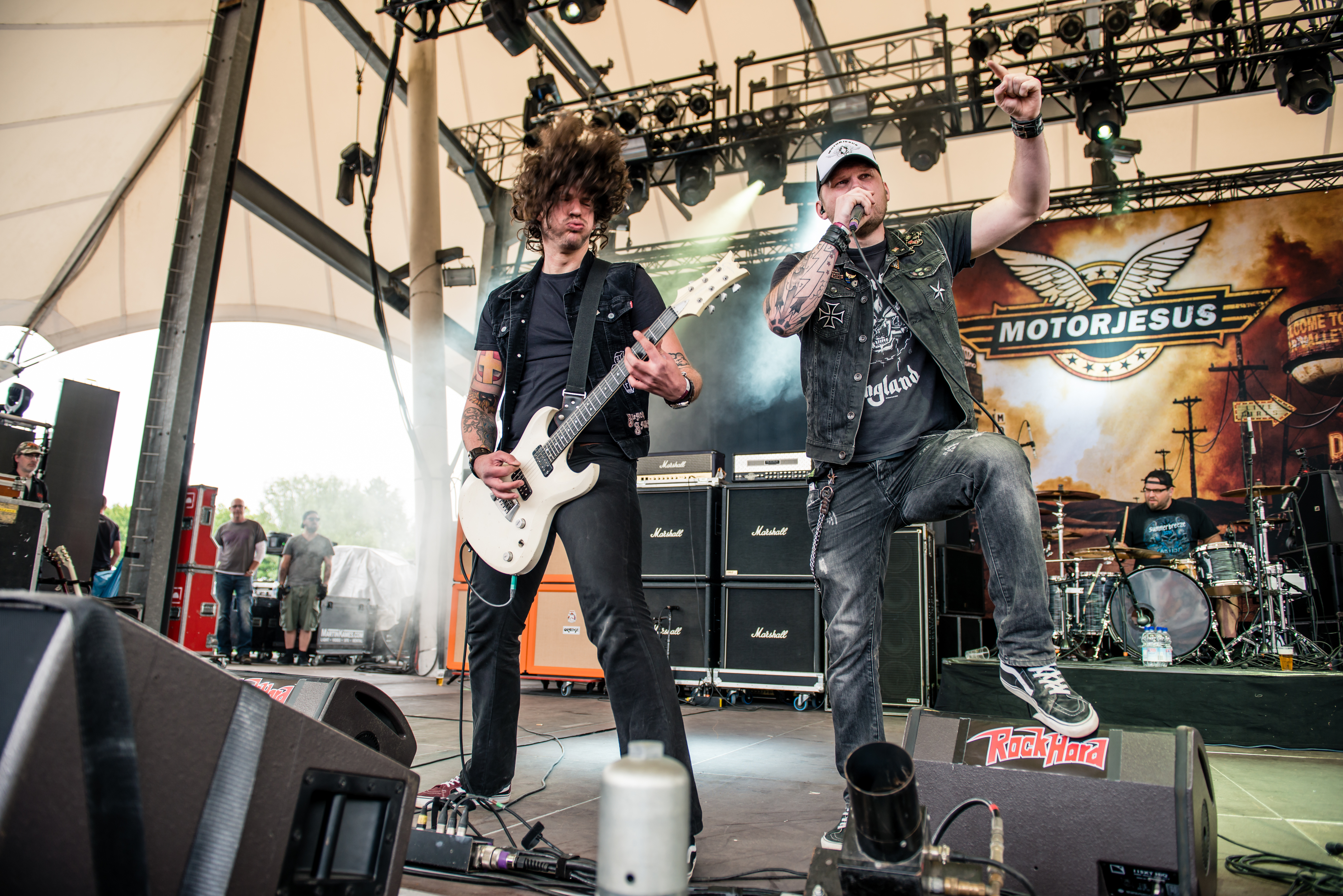 'Rock Hard Festival 2015; Gelsenkirchen Amphitheater': 'Motorjesus'